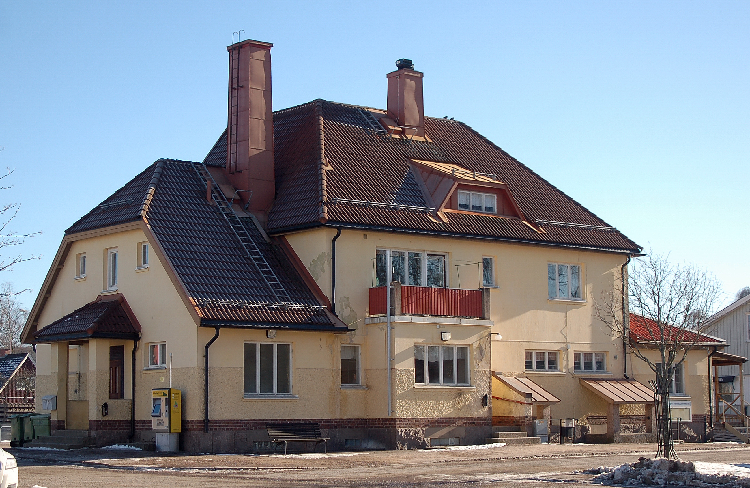 Järnvägstationen i Sunne. Byggt 1913. Arkitekt Yngve Rasmussen.